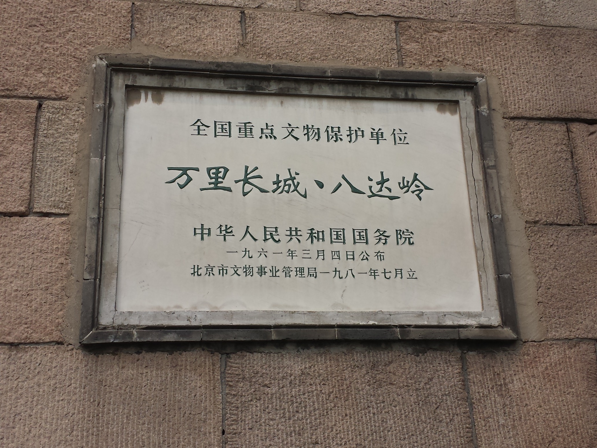 全国重点文物保护单位万里长城的文保牌之一